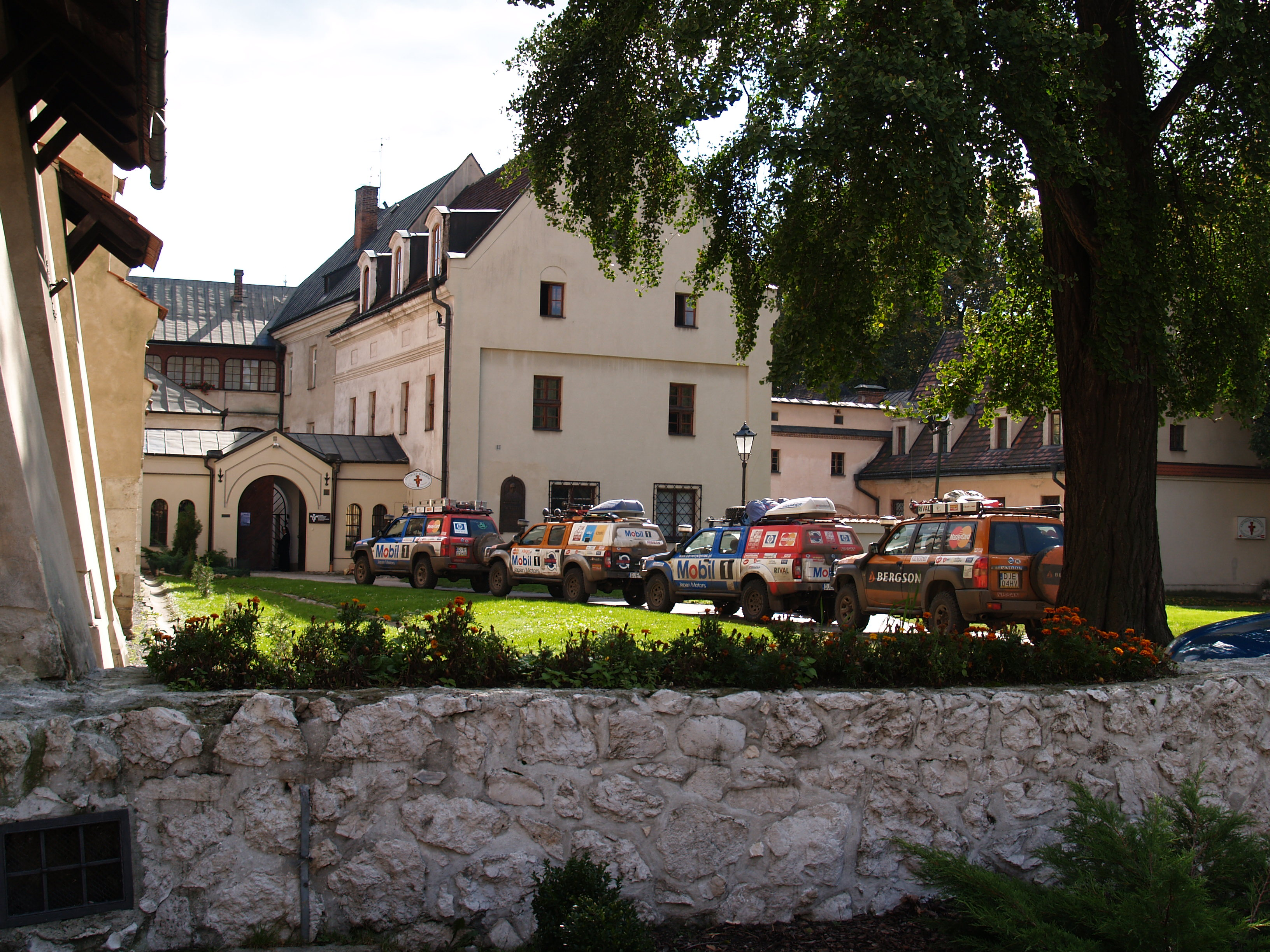 Klasztor Franciszkanów w Krakowie